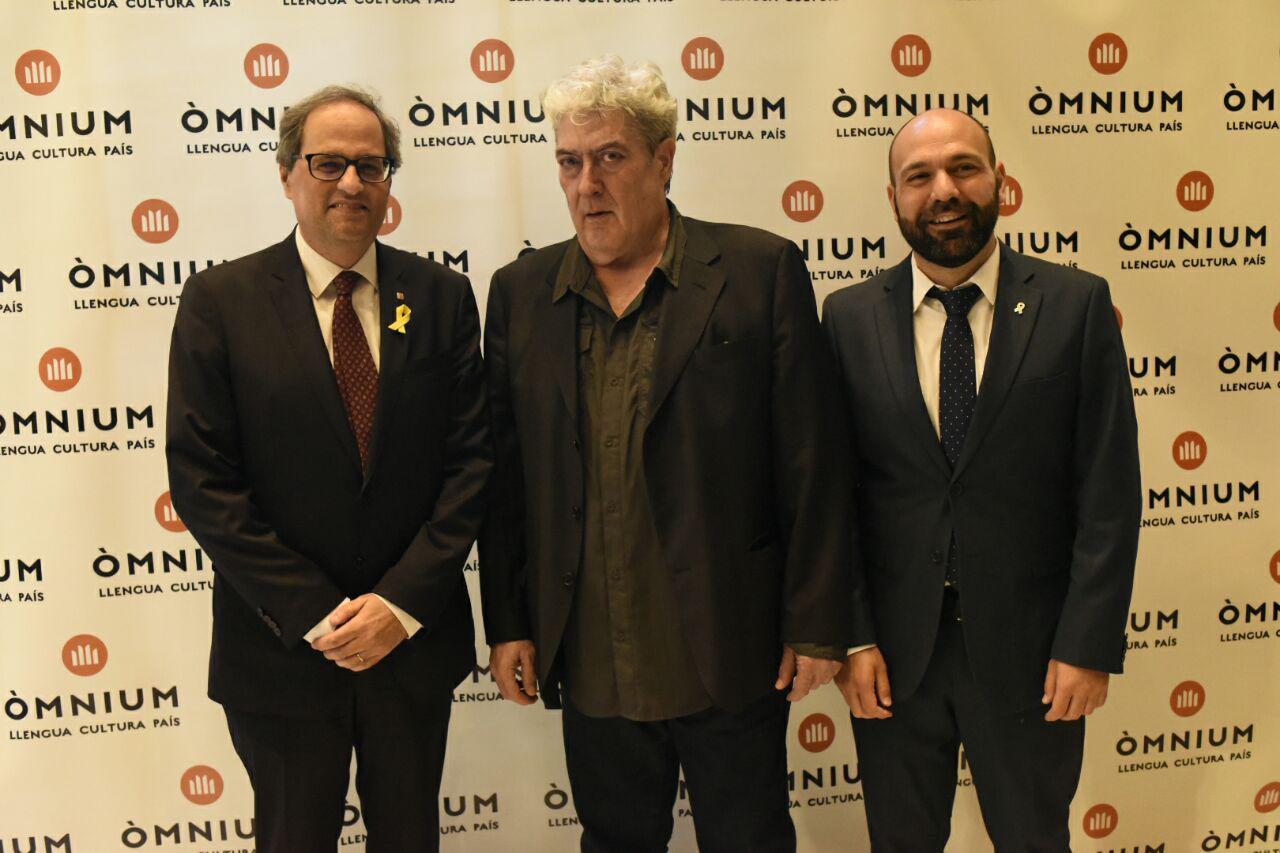 Quim Monzó rep el 50è Premi d'Honor de les Lletres Catalanes al Palau de la Música Catalana el 4 de juny de 2018. Per primera vegada a la història d'Òmnium, el president no pot entregar el guardó al premiat: Jordi Cuixart és a la presó des del 16 d'octubre de 2017.